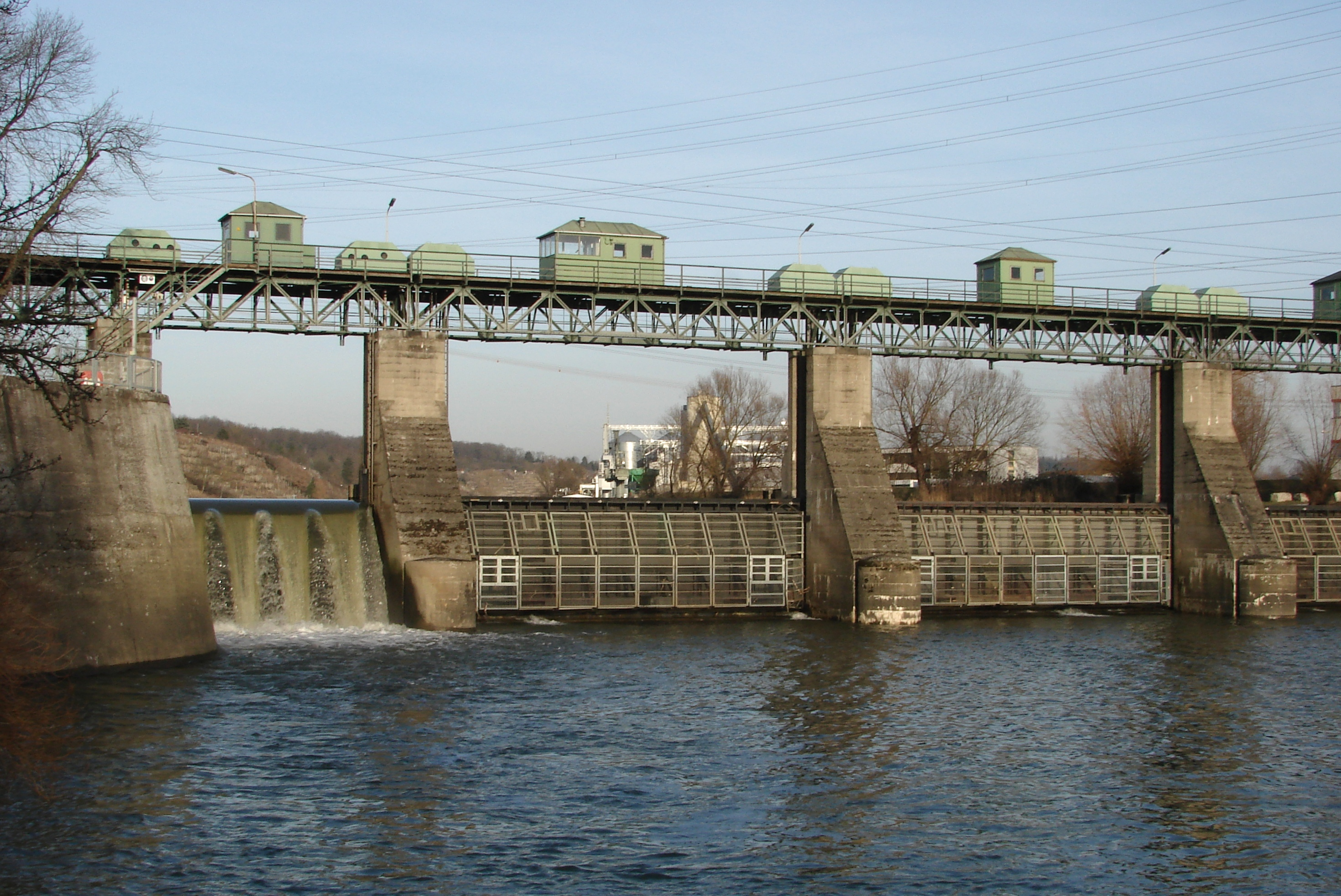 Freiberg am Neckar, weir